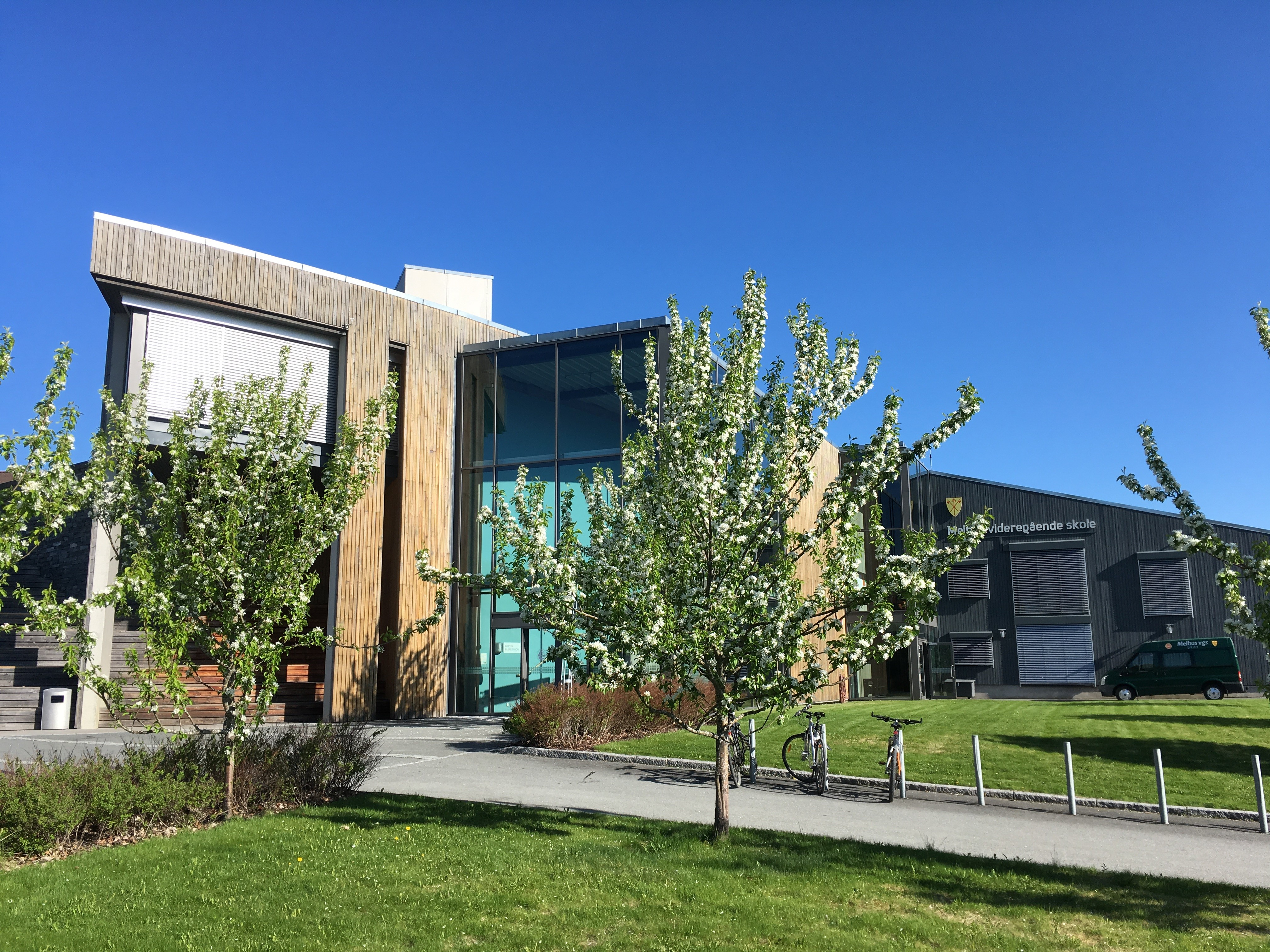 Skolen 2018. Hovedinngangen.